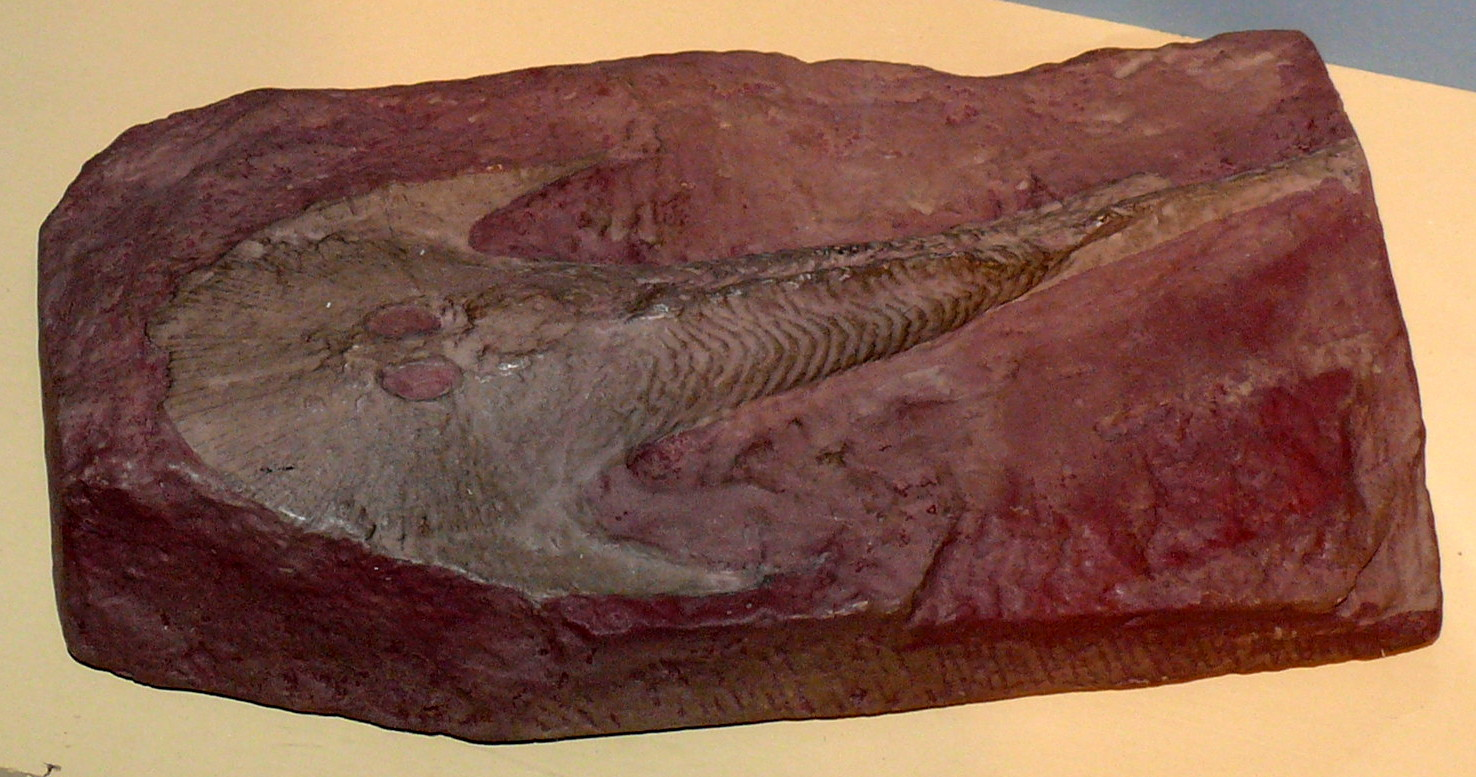 Cephalaspis, Fundort: England. Gotlandium bis Devon. Europa, Amerika.